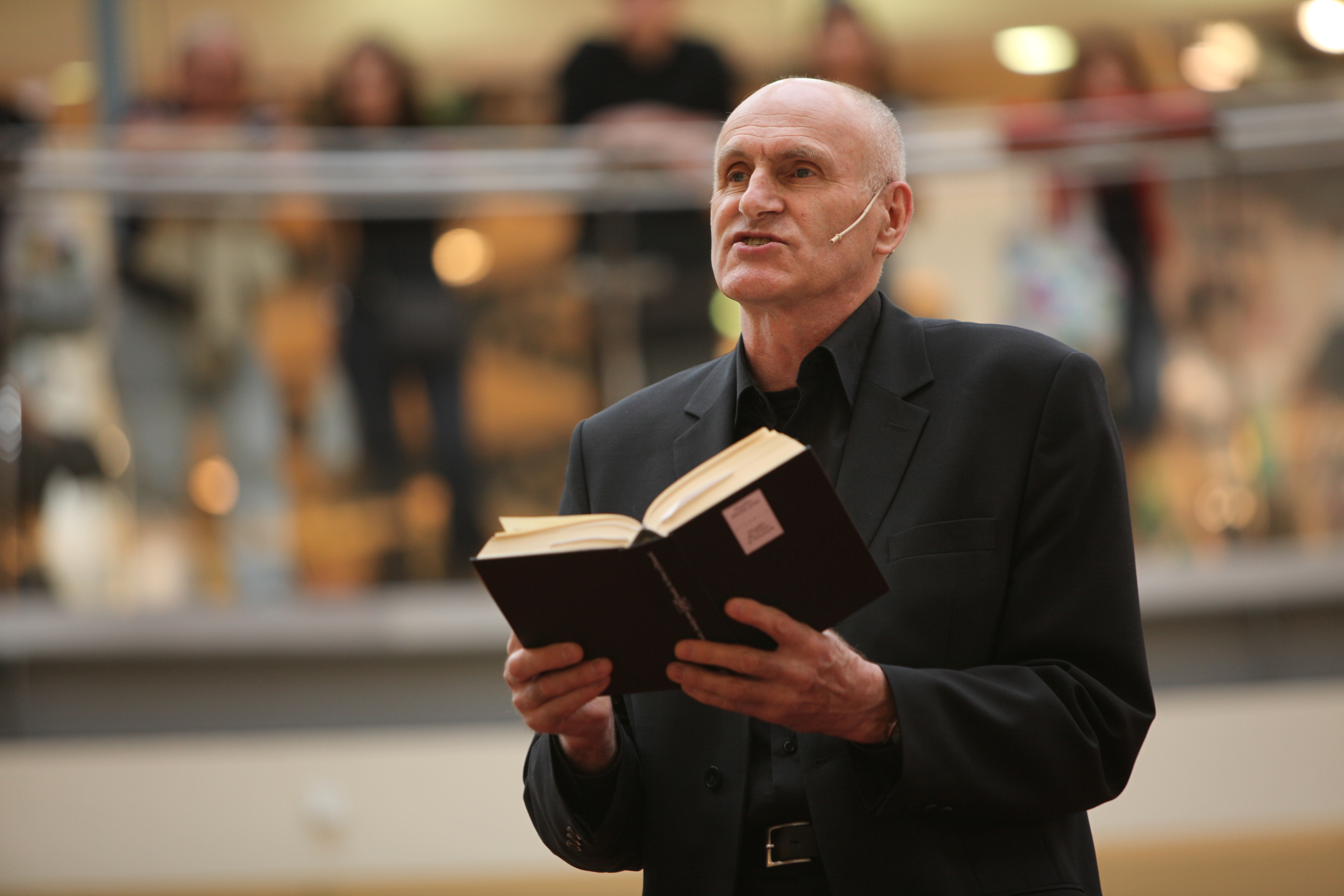 Martin Hilský na vernisáži výstavy k 10. ročníku Brněnských shakespearovských dnů